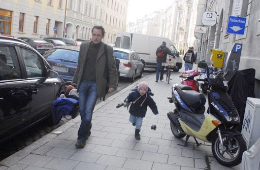 Vater mit Kindern, München